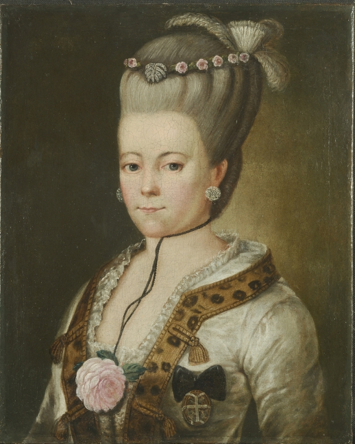 Беларуская (тарашкевіца): Партрэт Яны Сапегі (Jana Sapieha) з роду Сулкоўскіх (Sułkowscy)